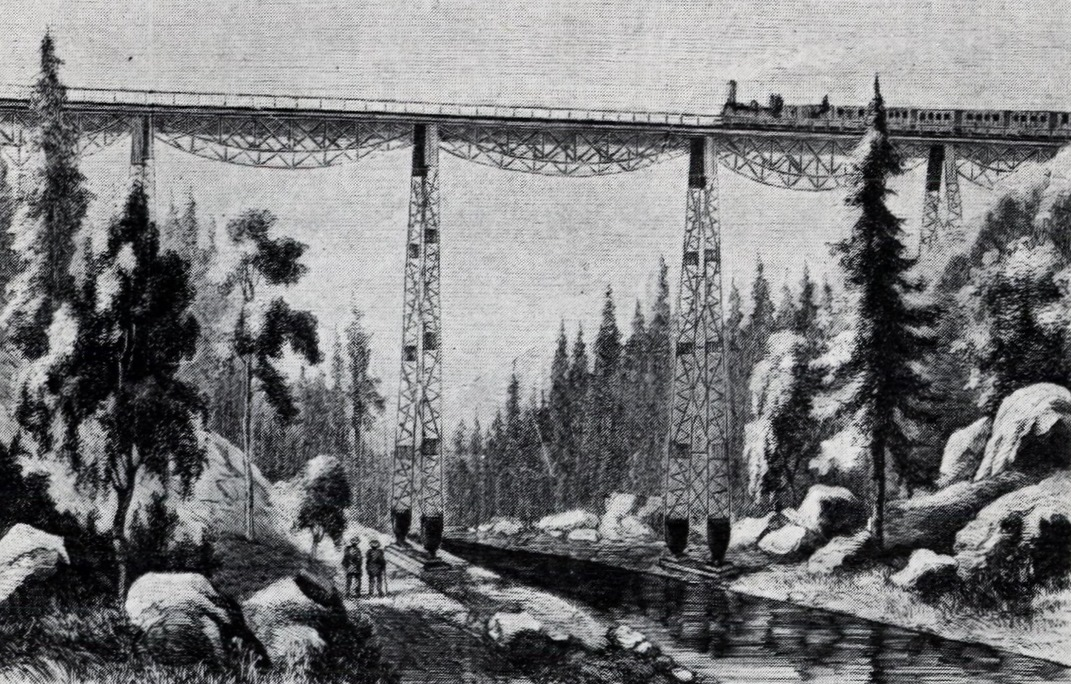 Lysedal viadukt, mellom Prestebakke og Kornsjø, fører Østfoldbanen over Elja. Fra Just Broch: «Av Norges statsbaners historie 2: Anleggene gjennem syttiårenes lys inn i åttiårenes mørke» (1936), s. 93.